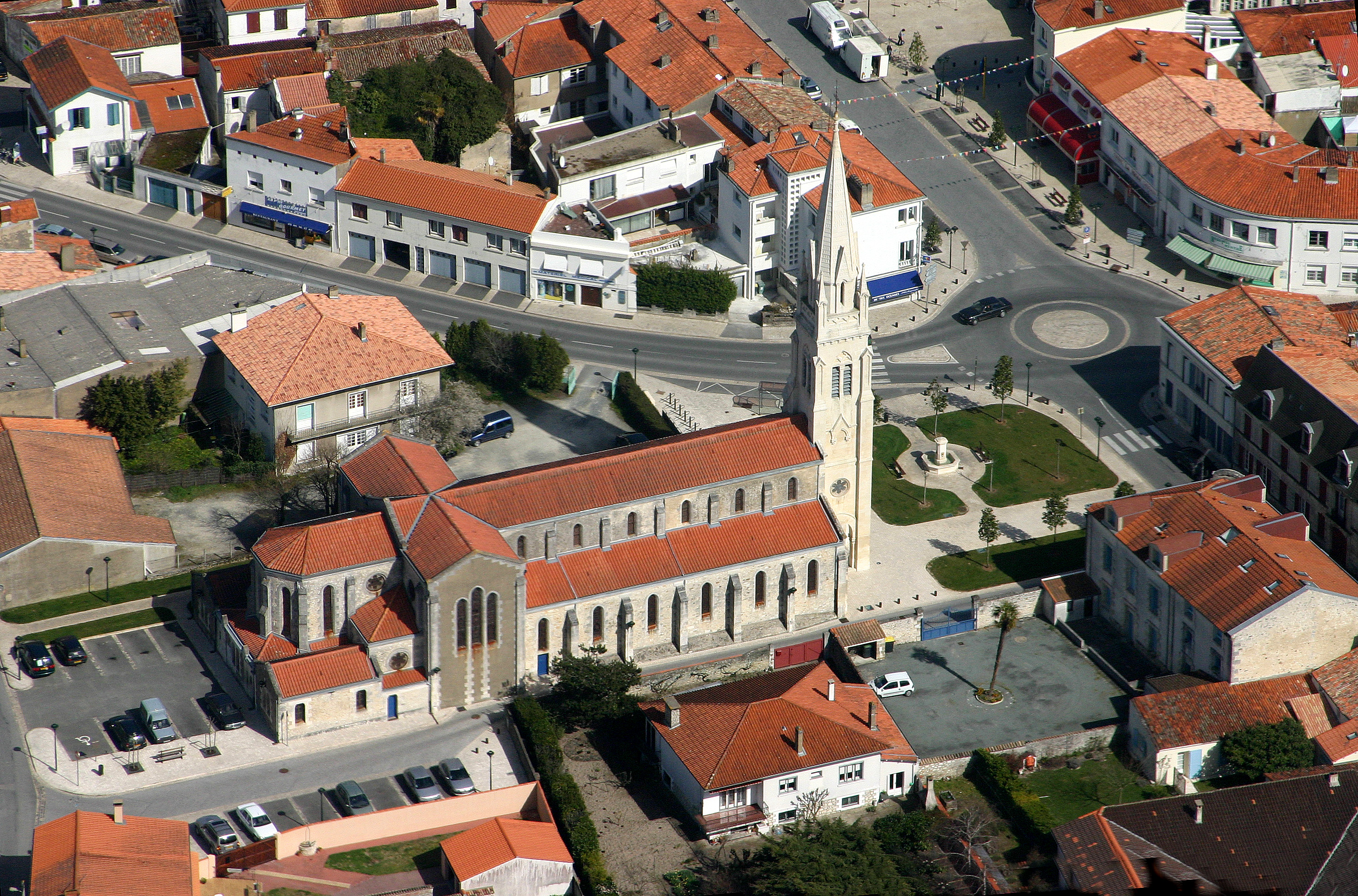 La Tremblade. Église du Sacré-Coeur